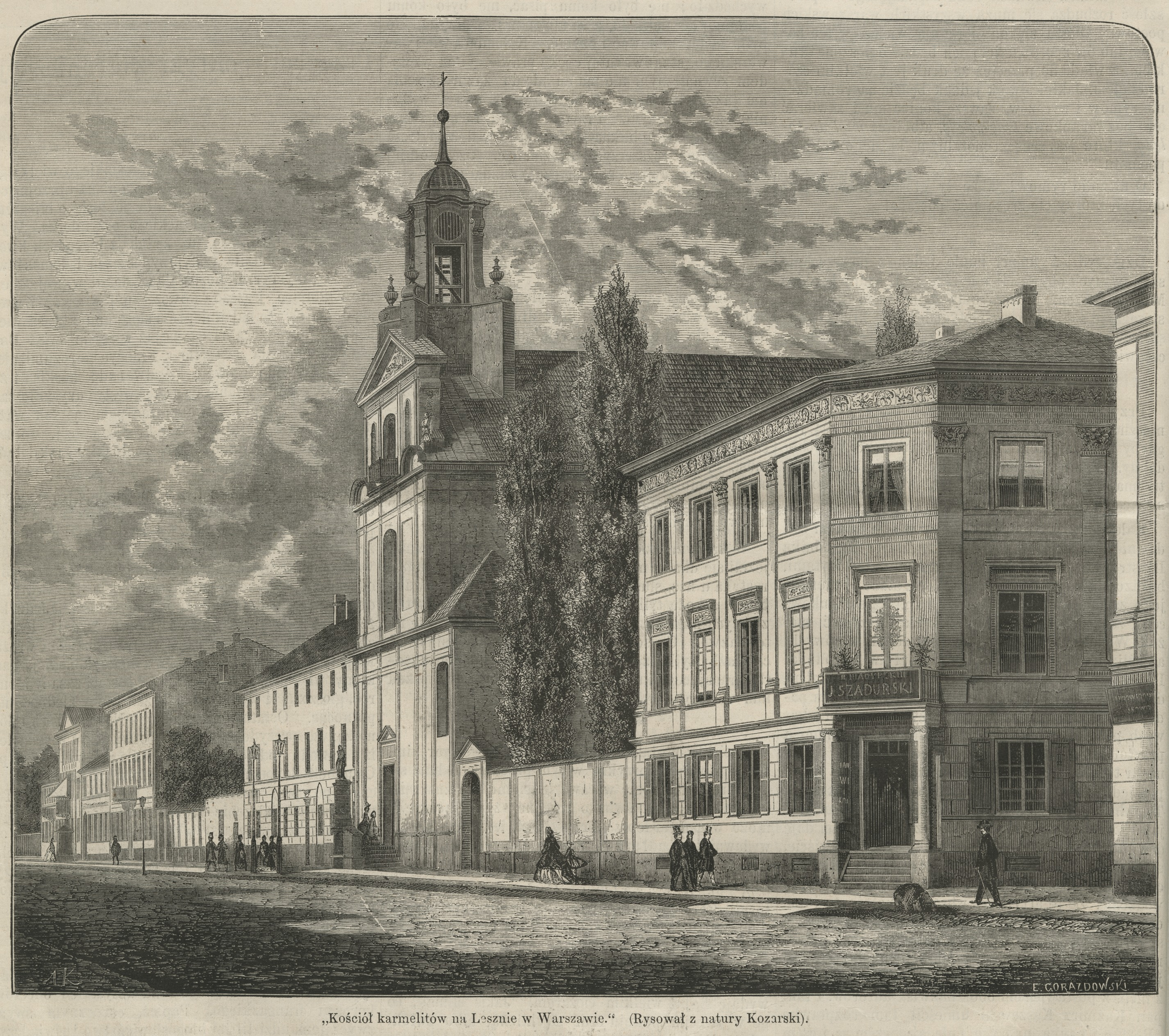 Kościół karmelitów na Lesznie w Warszawie : (Rysował z natury Kozarski)